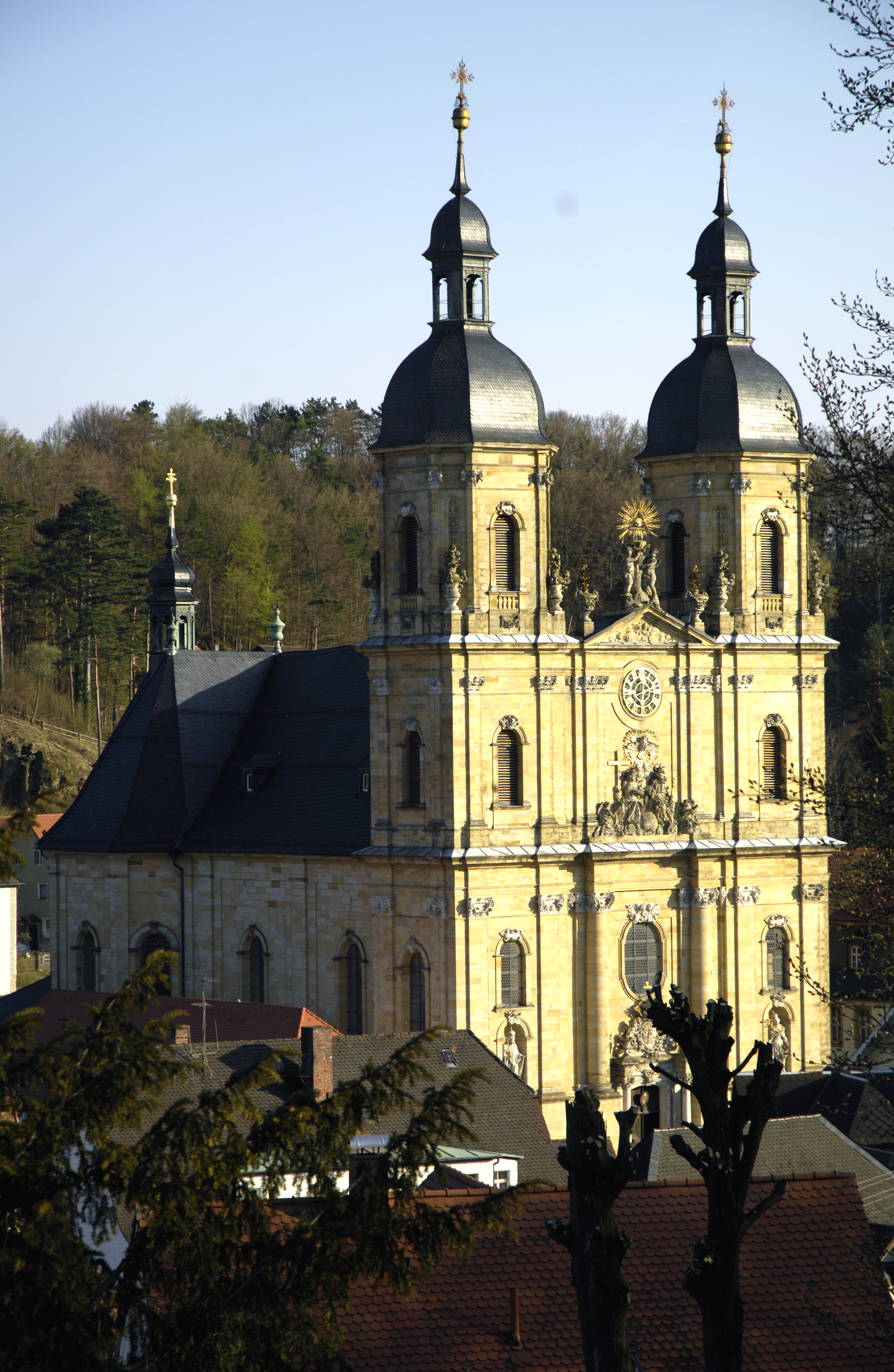 Gößweinstein, Wallfahrtsbasilika